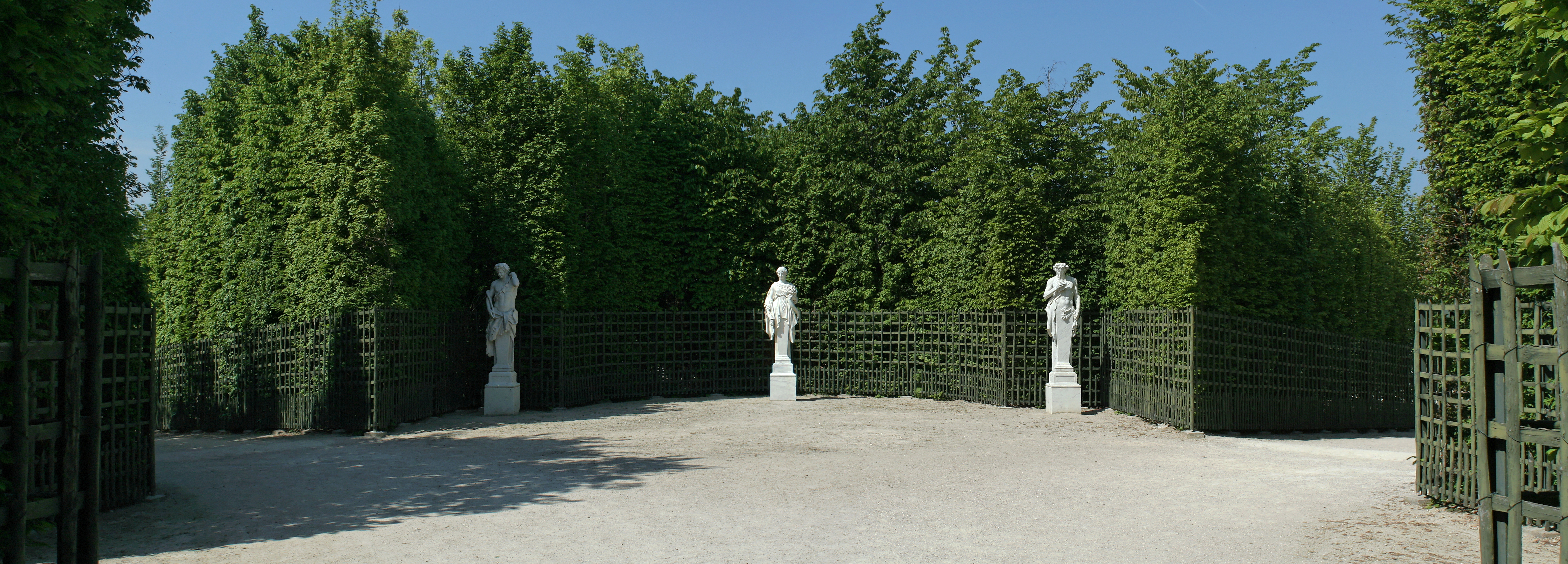 Parc de Versailles, Bosquet du Dauphin. Salle de verdure Est. Termes en marbre blanc d'après Nicolas Poussin représentant (de gauche à droite) un Faune, La Libéralité et Pan. Ces sculptures ont été réalisées pour le château de Vaux-le-Vicomte et achetées par Louis XIV aux descendants de Nicolas Fouquet.